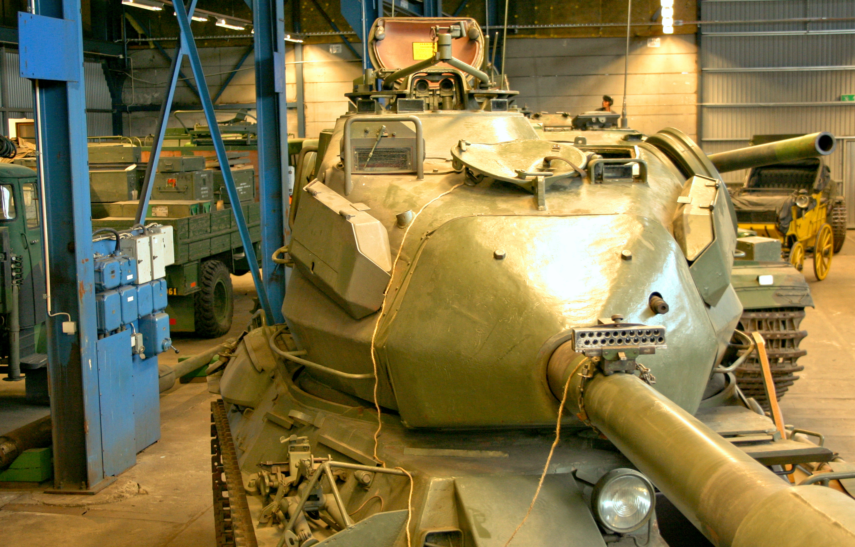 Stridsvagn 74 i Hässleholms Museum 03.08.2008